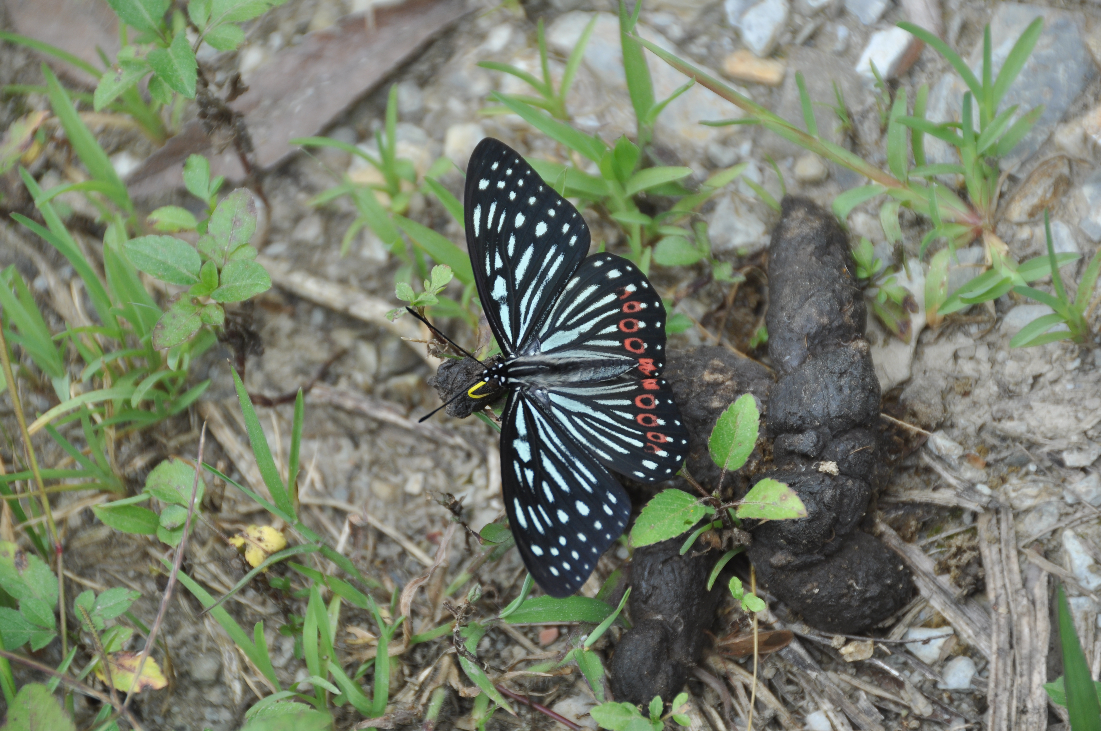 366紅星斑蛺蝶4(李淑惠攝)